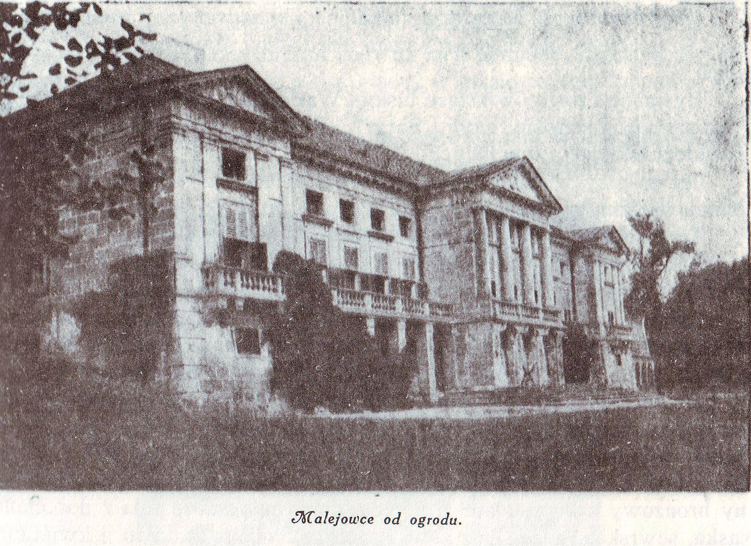 Malejowce - pałac Orłowskich